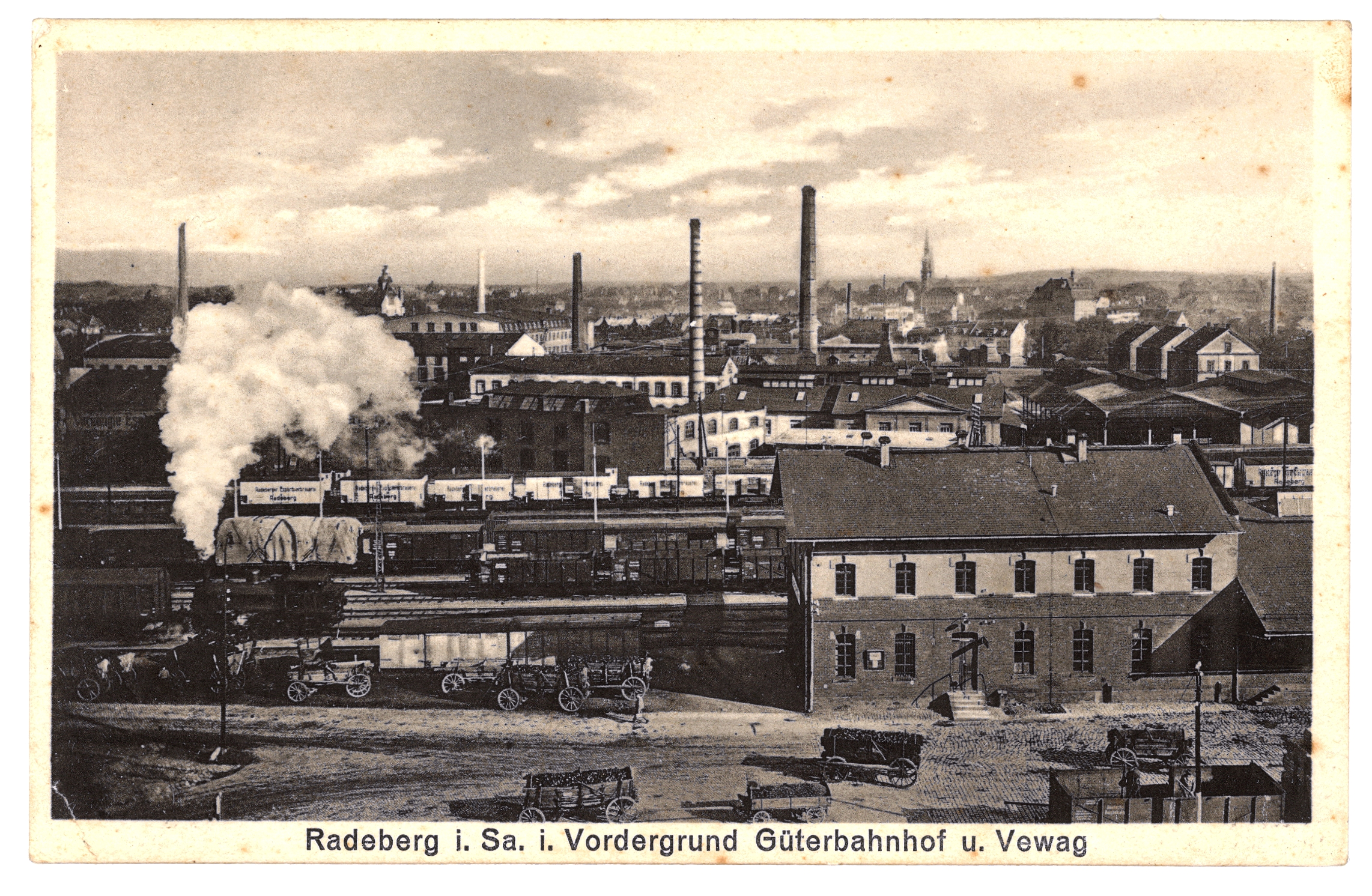 Ansicht Vereinigte Eschebach'sche Werke Aktiengesellschaft Radeberg (VEWAG) um 1916, im Vordergrund Teil des Güterbahnhofes Radeberg